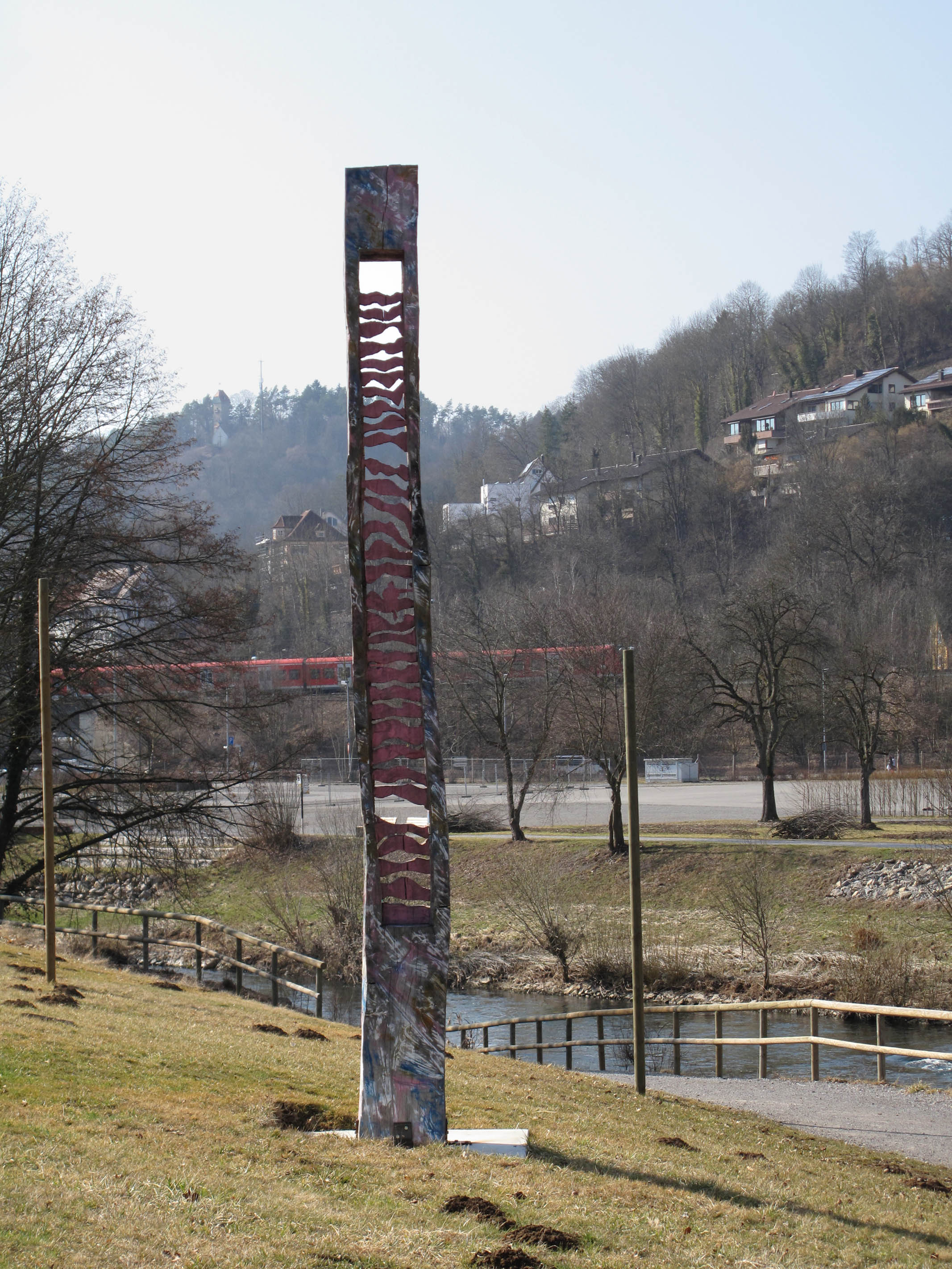 Georg Janthur, NeckarWellenSicht, 2011, - Deutschland, Baden-Württemberg, Horb am Neckar, am Neckartal-Radweg Richtung Horb-Mühlen